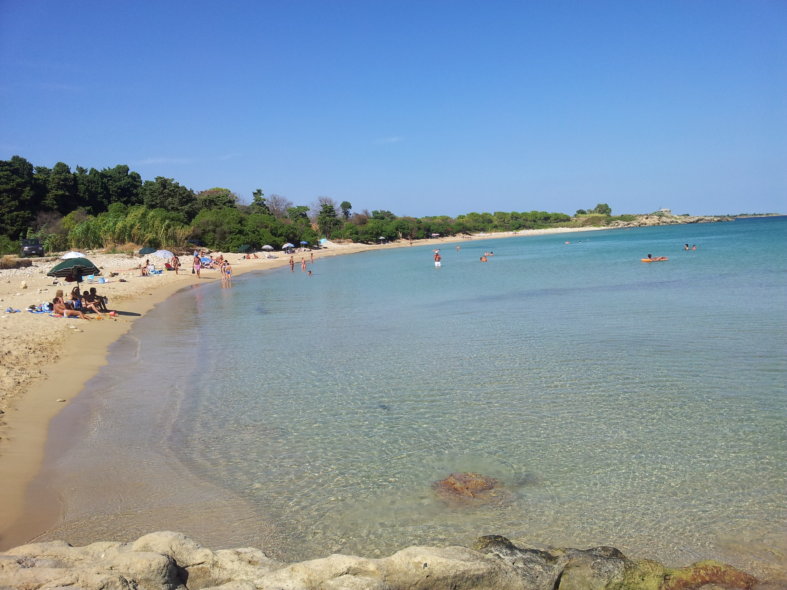 Spiaggia Marchesa di Cassibile, Siracusa